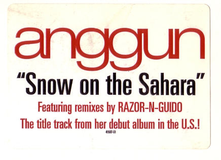 Singelomslag till Angguns låt "Snow on the Sahara"